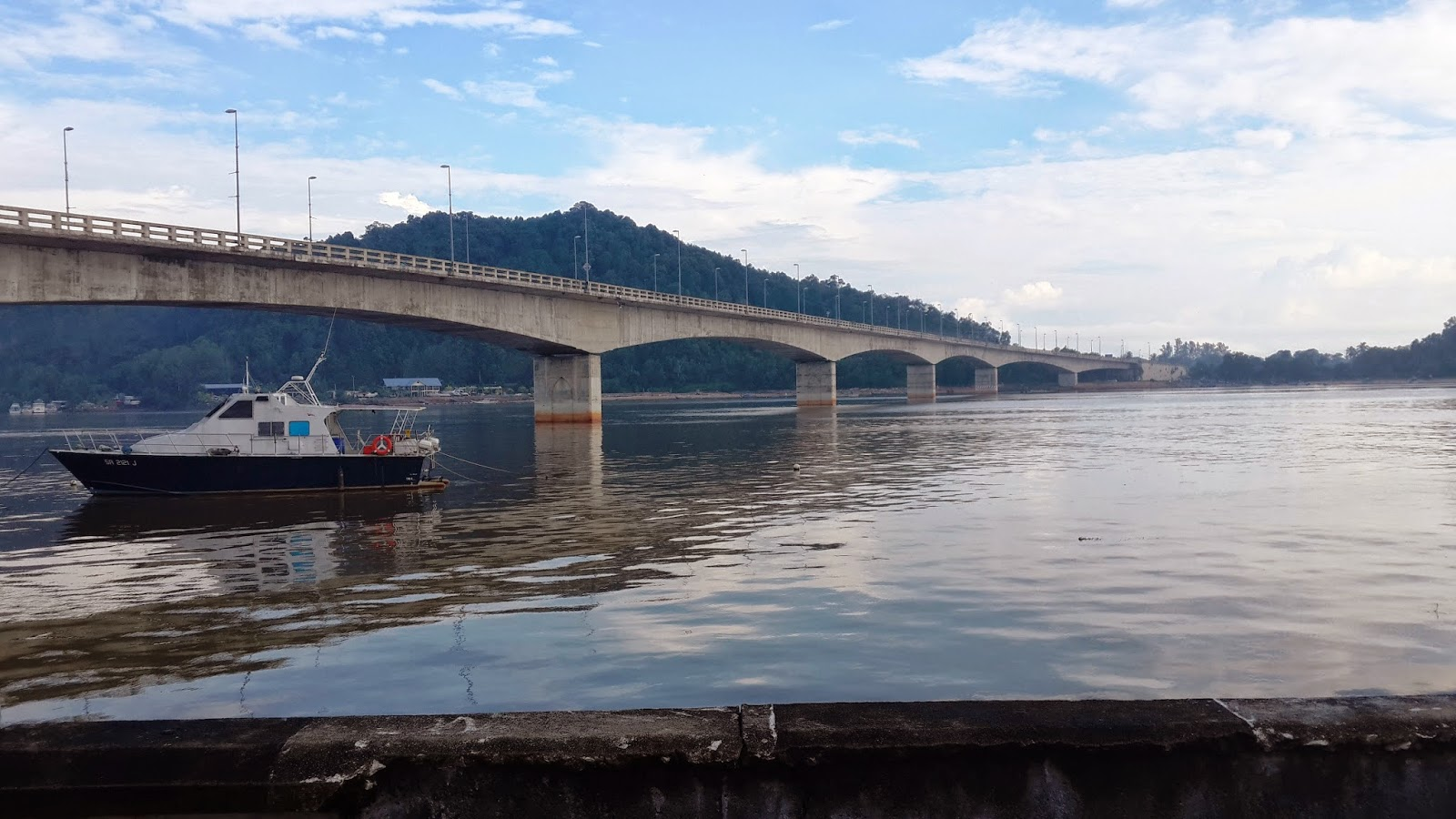 Gambar Jambatan Baru Dungun yang diambil pada tahun 2014 ini dimiliki oleh Che Sall.